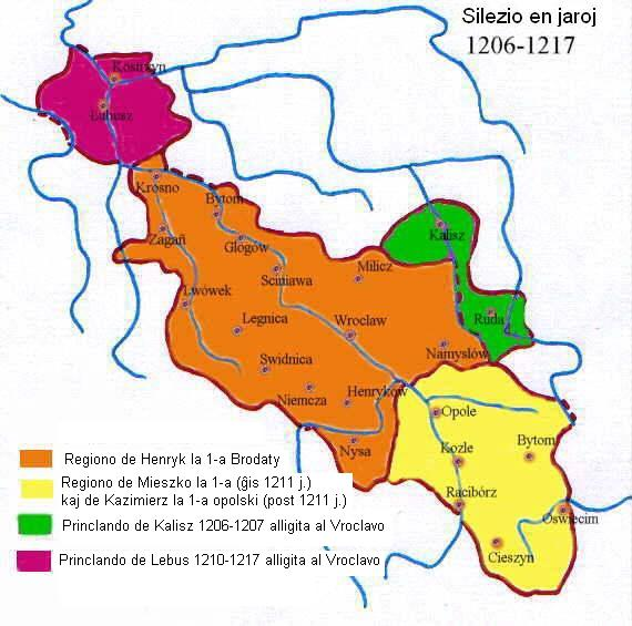 Mapa Śląska w latach 1201-1202 z opisami a języku esperanto.